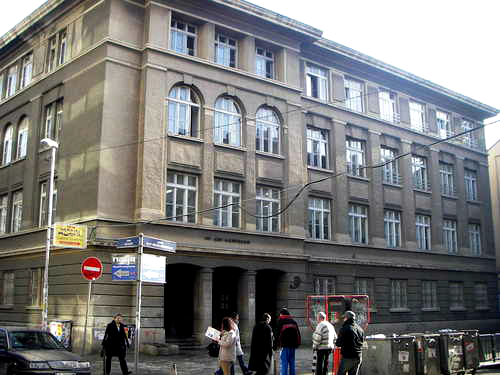 133 СОУ "А.С. Пушкин"